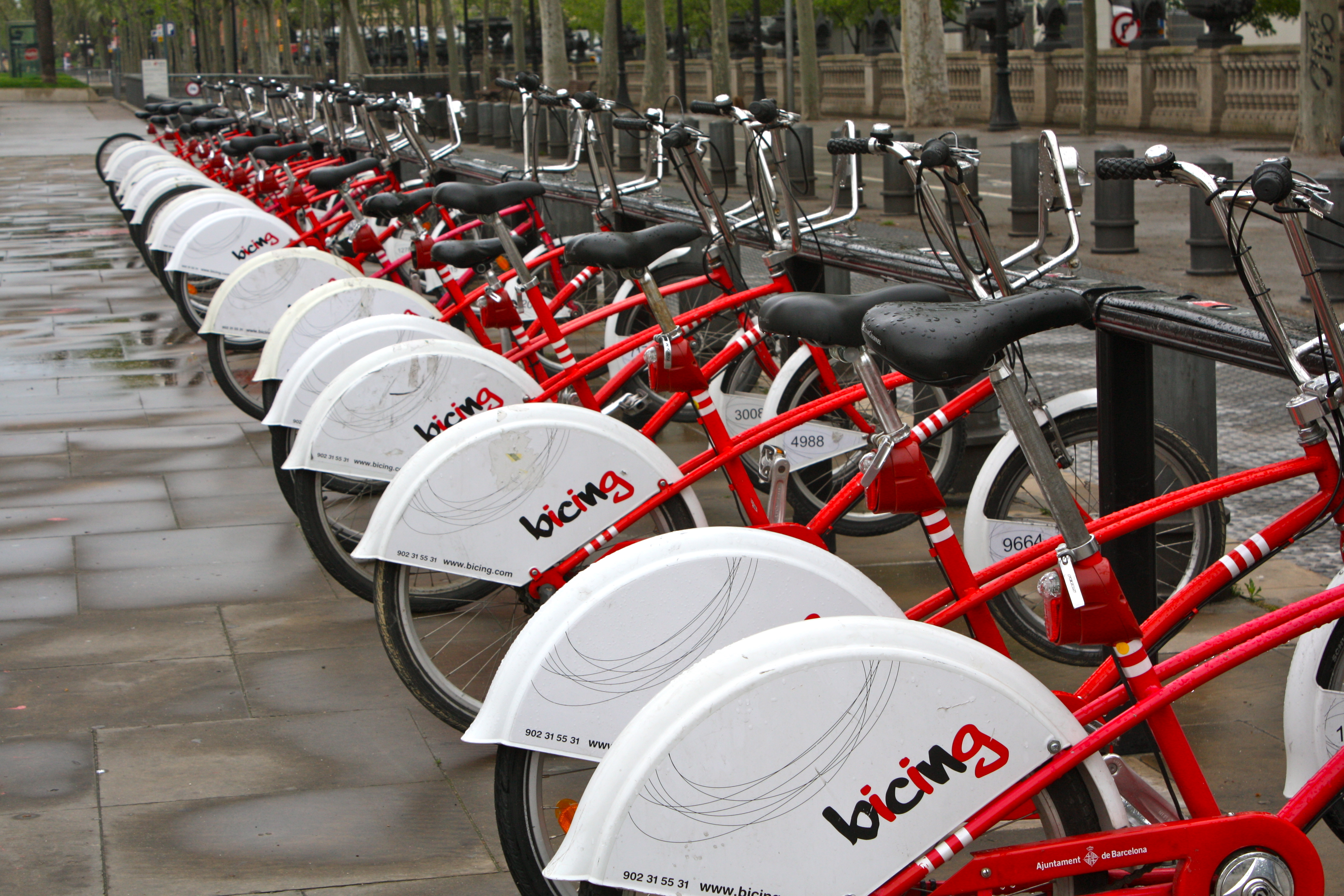 Barcelona - 104